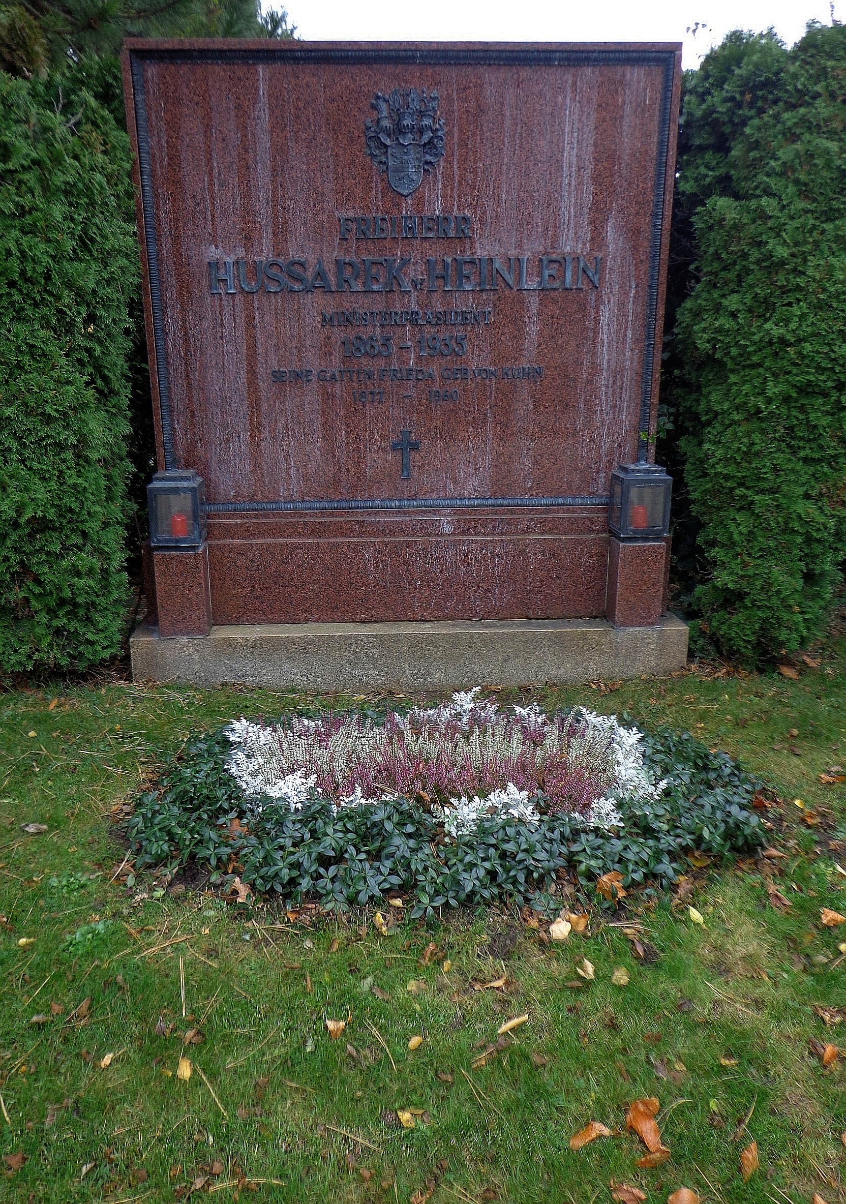 Wiener Zentralfriedhof - Gruppe 14 C, Ehrengrab des kaiserlich österreichischen Ministerpräsidenten Max Hussarek von Heinlein